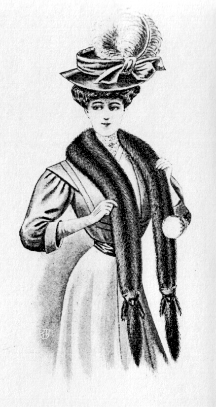 Fur prospectus